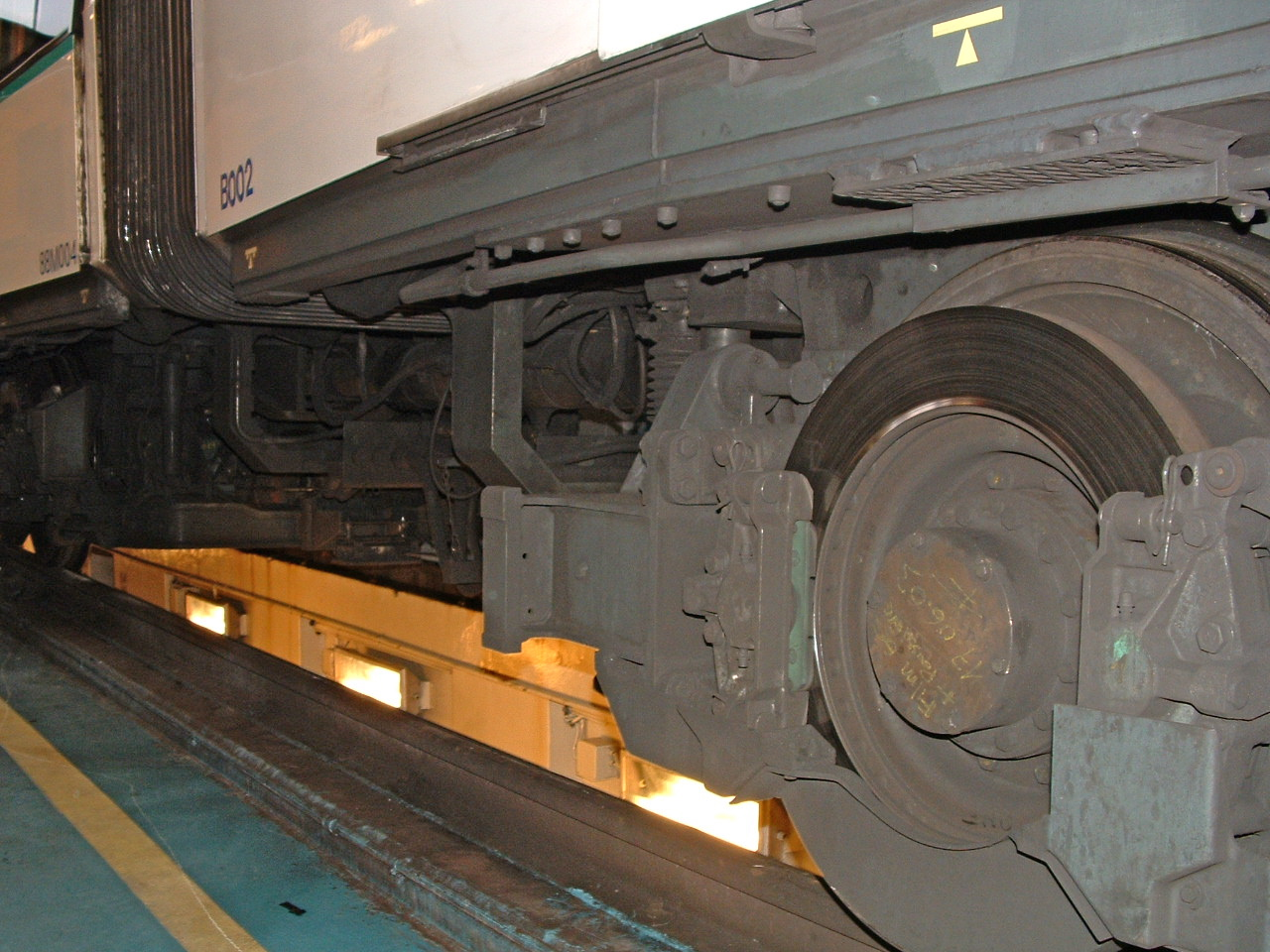 Essieu d'un train MF 88 aux ateliers de Choisy.